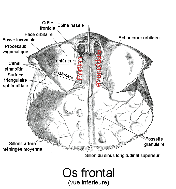 Os frontal. Vue inférieure. Anatomie humaine